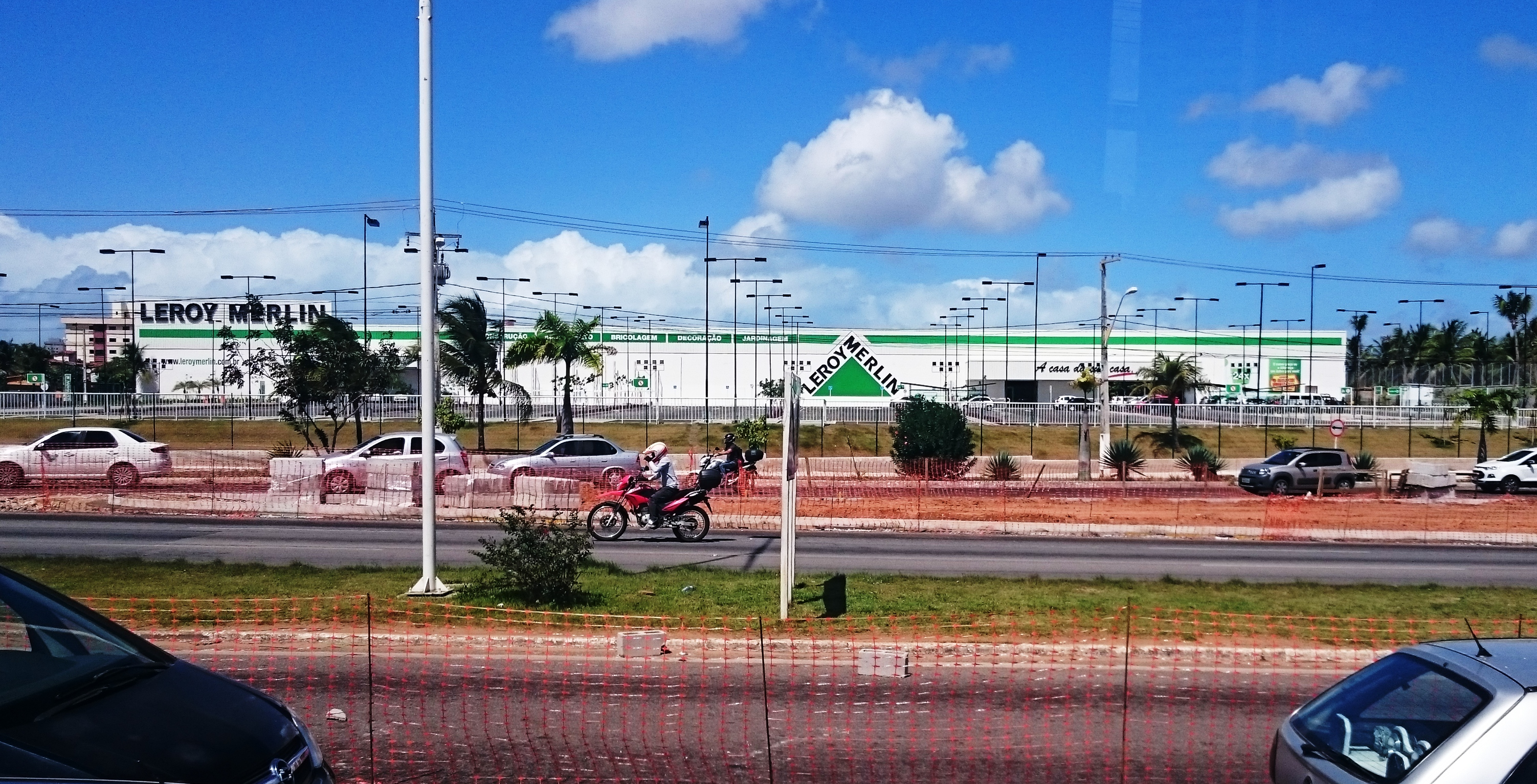 Leroy Merlin, localizado em Natal, Rio Grande do Norte, Brasil